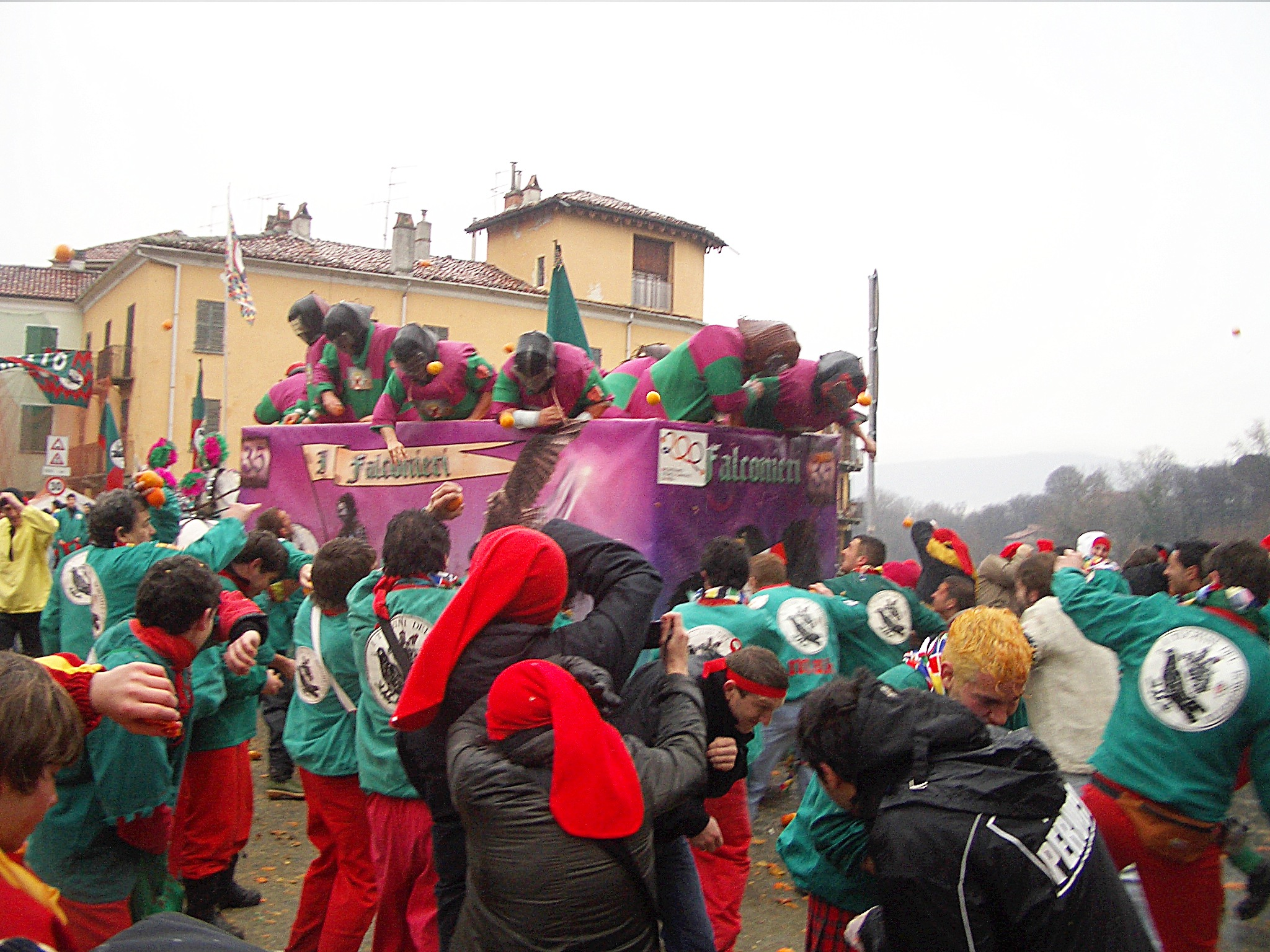 Carnival of Ivrea, Battaglia delle arance (Orange-battle)